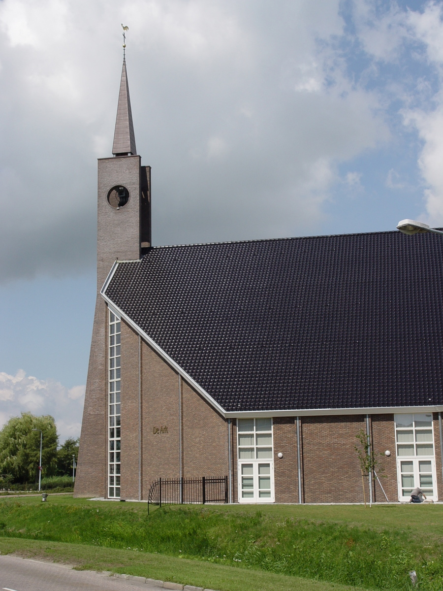 Kerk de Ark Urk